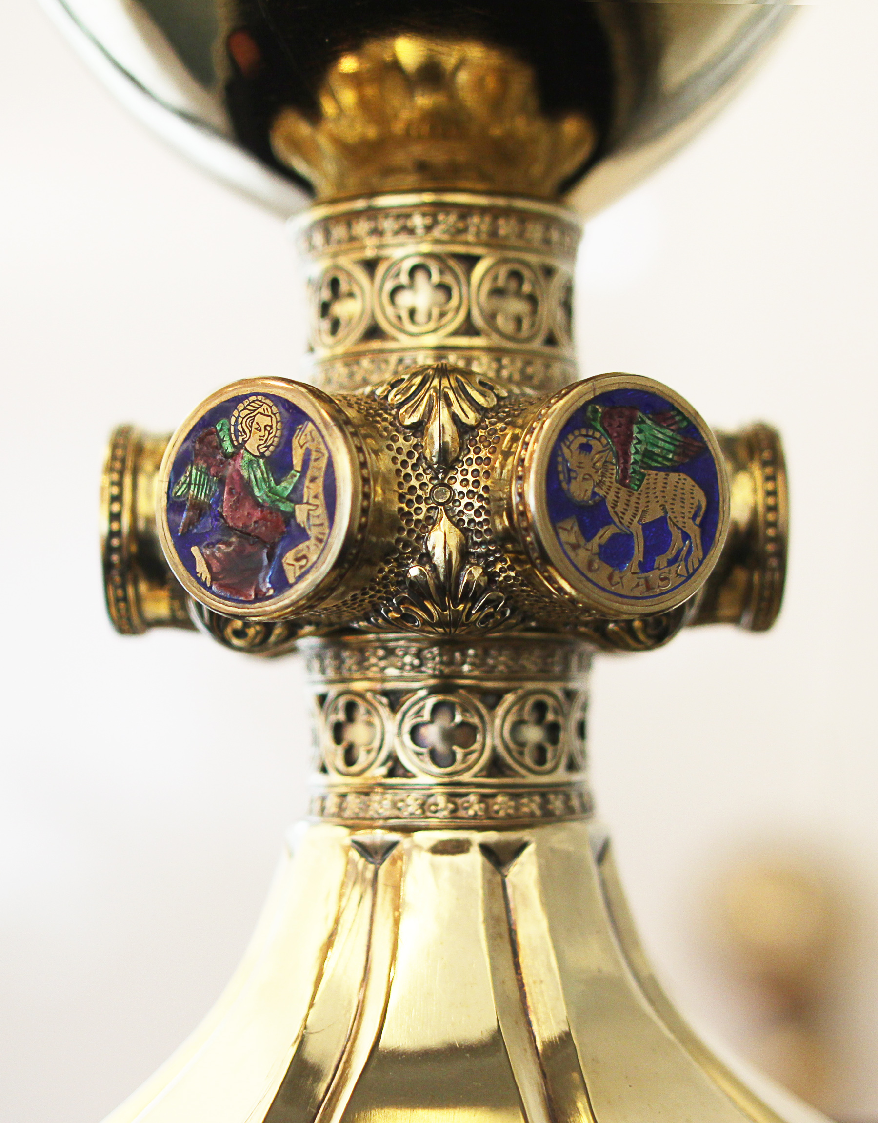 Die fotografierte Kopie des Wolfurter Kelches von 1364 ist Gemeindeamt Wolfurt augestellt. Das Original befindet sich im Schweizerischen Nationalmuseum.